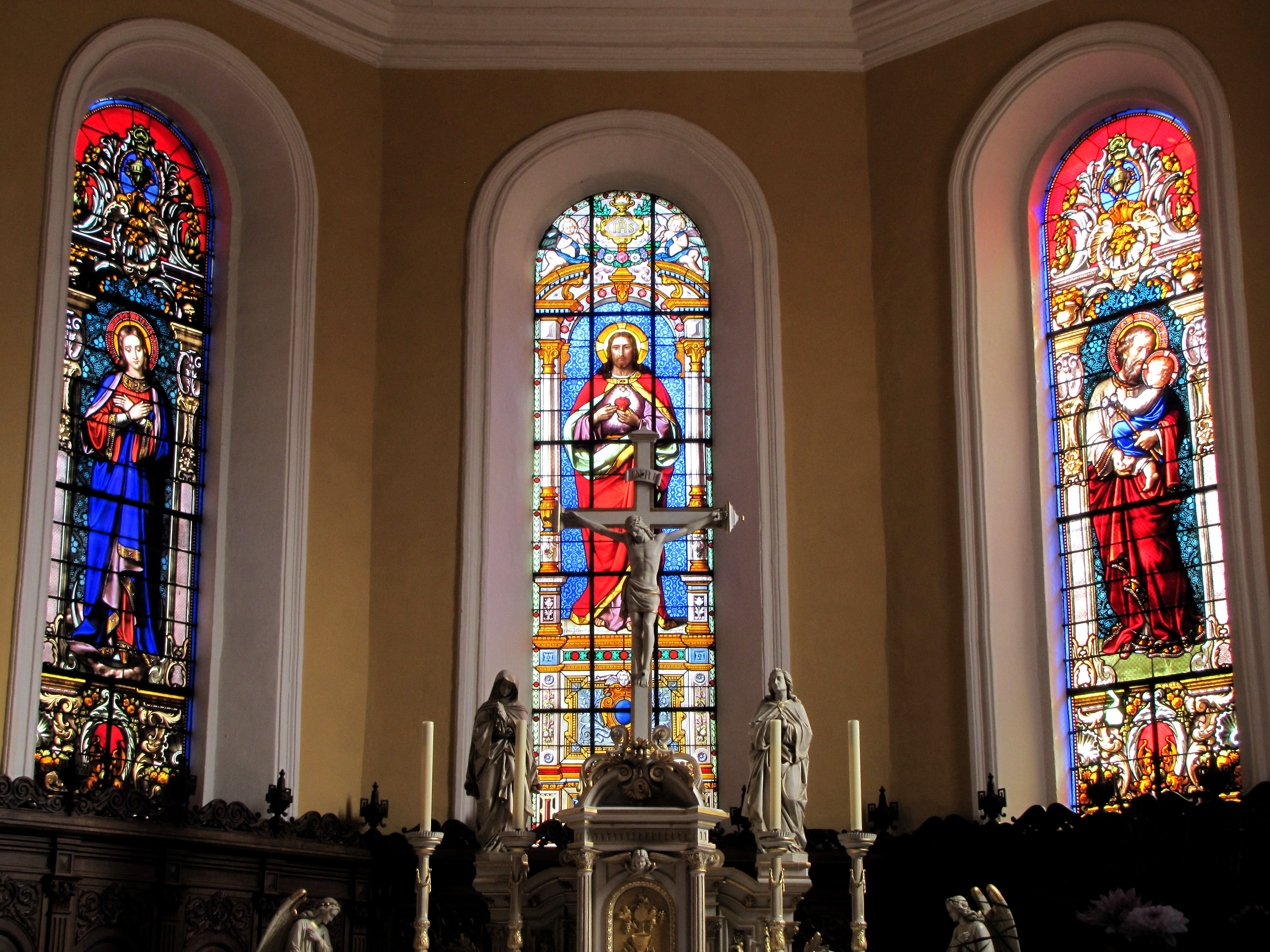 Alsace, Haut-Rhin, Église Saints-Pierre-et-Paul (XIIIe-XIXe) d'Eguisheim (PA00085415, IA68000505).